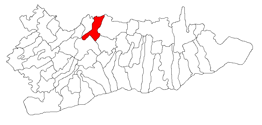 Categorie:Hărţi ale judeţului Călăraşi